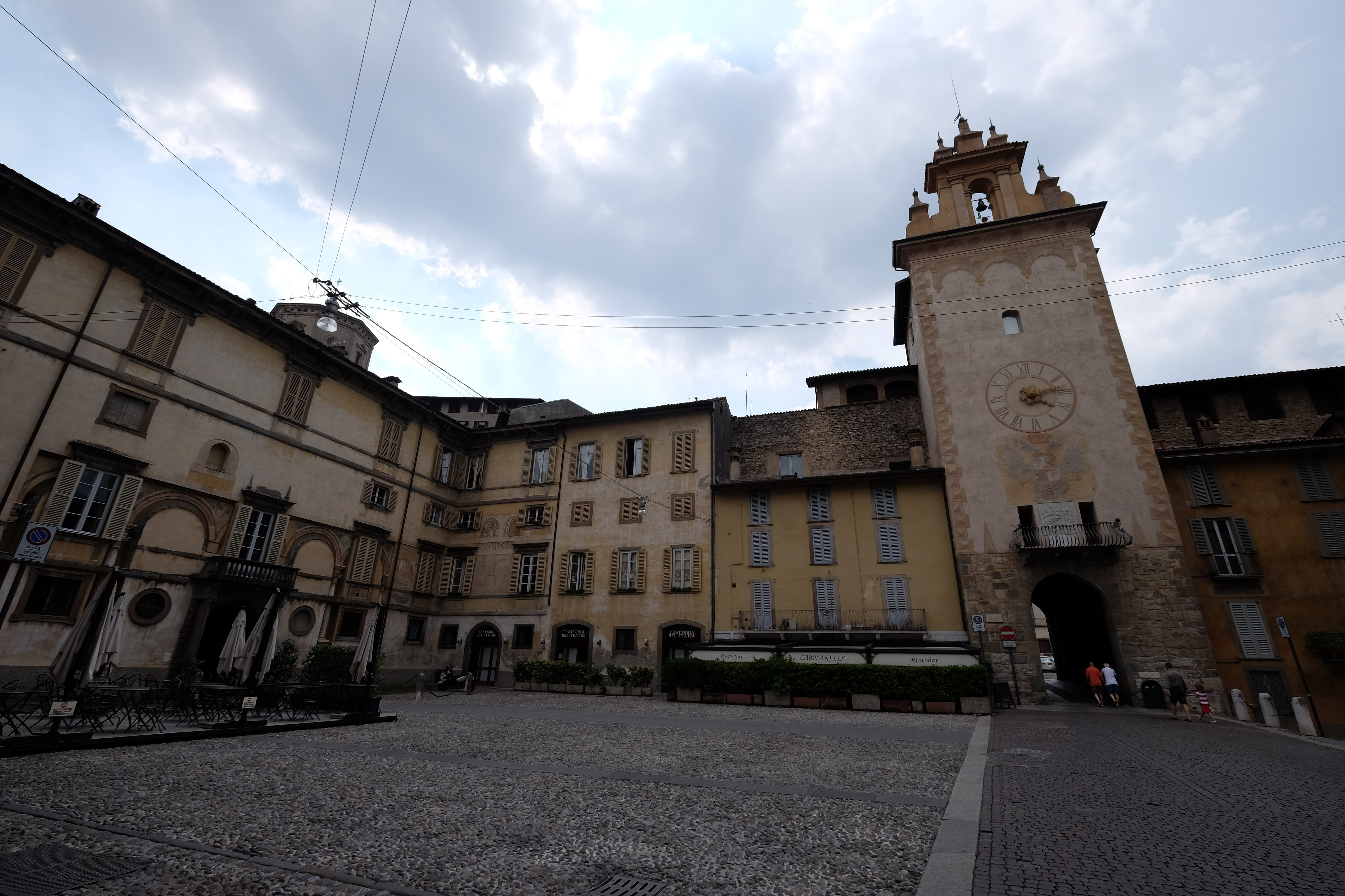 Città Alta, Bergamo BG, Italy